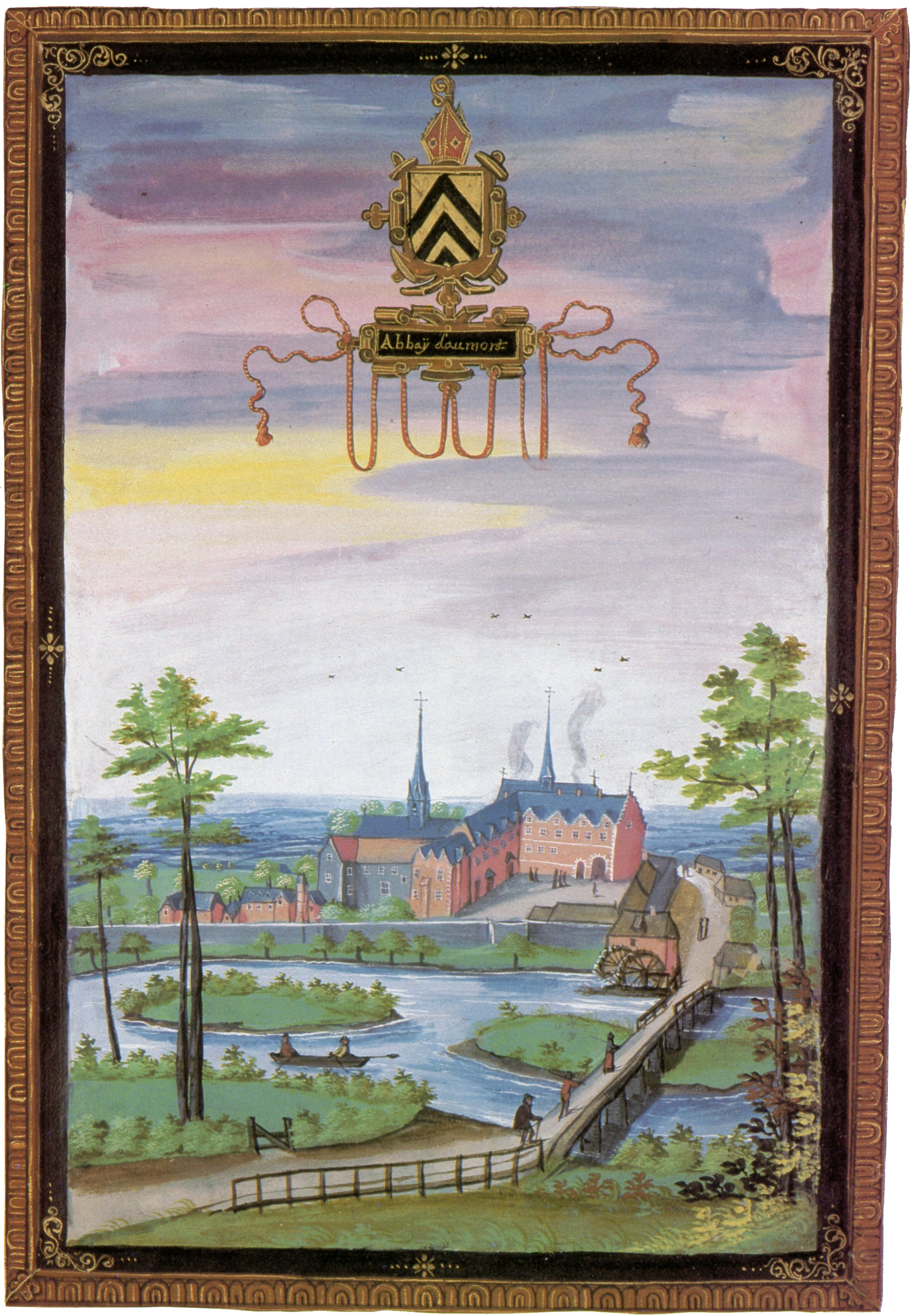 Abbaye d'Haumont en 1598. Albums de Croÿ, Vienne, Österreichische Nationalbiblithek.